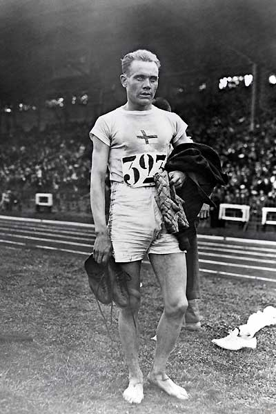 Paavo Nurmi 1924 Olympics